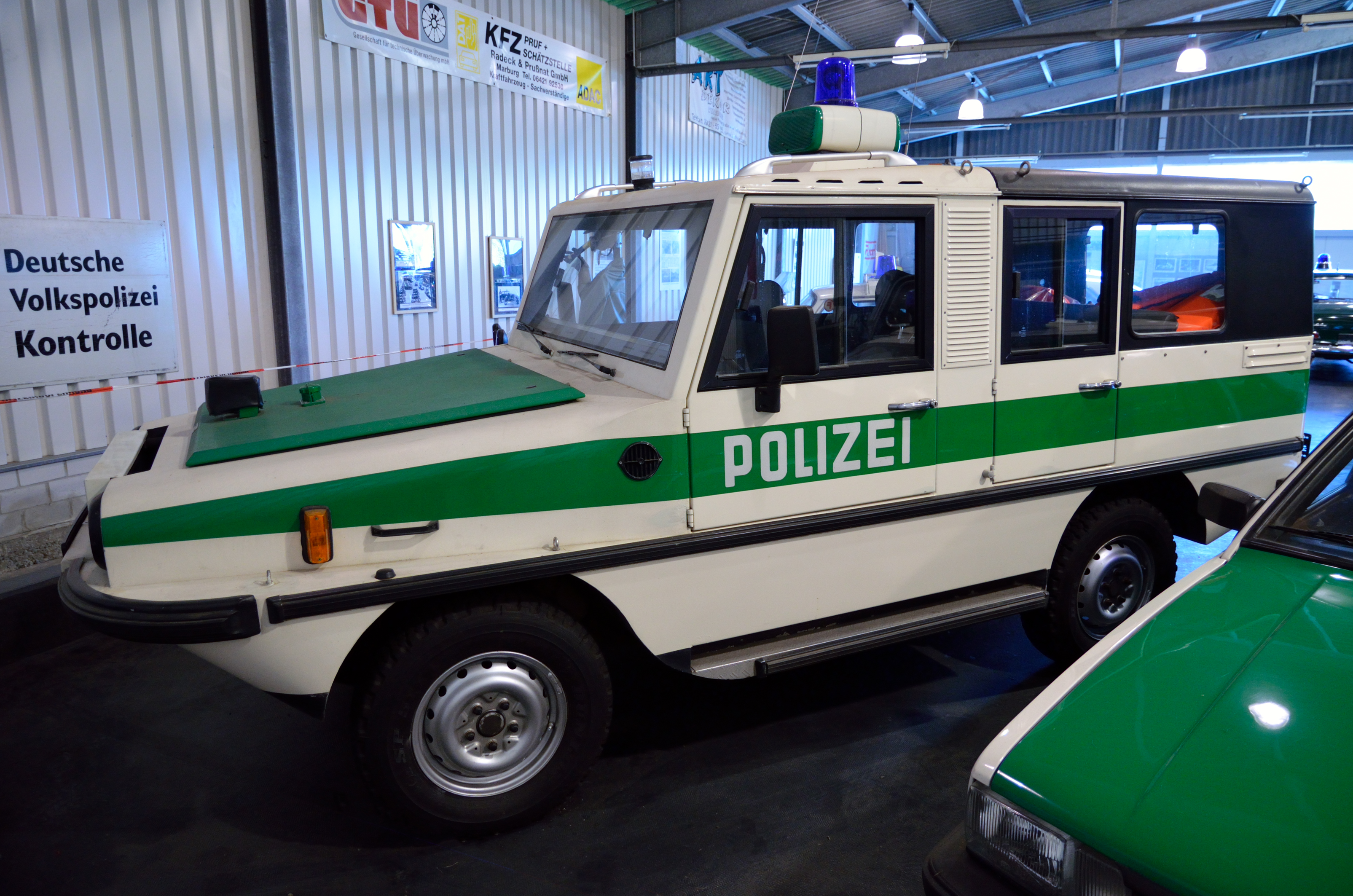 Amphi-Ranger im 1. Deutschen Polizeioldtimer-Museum in Marburg